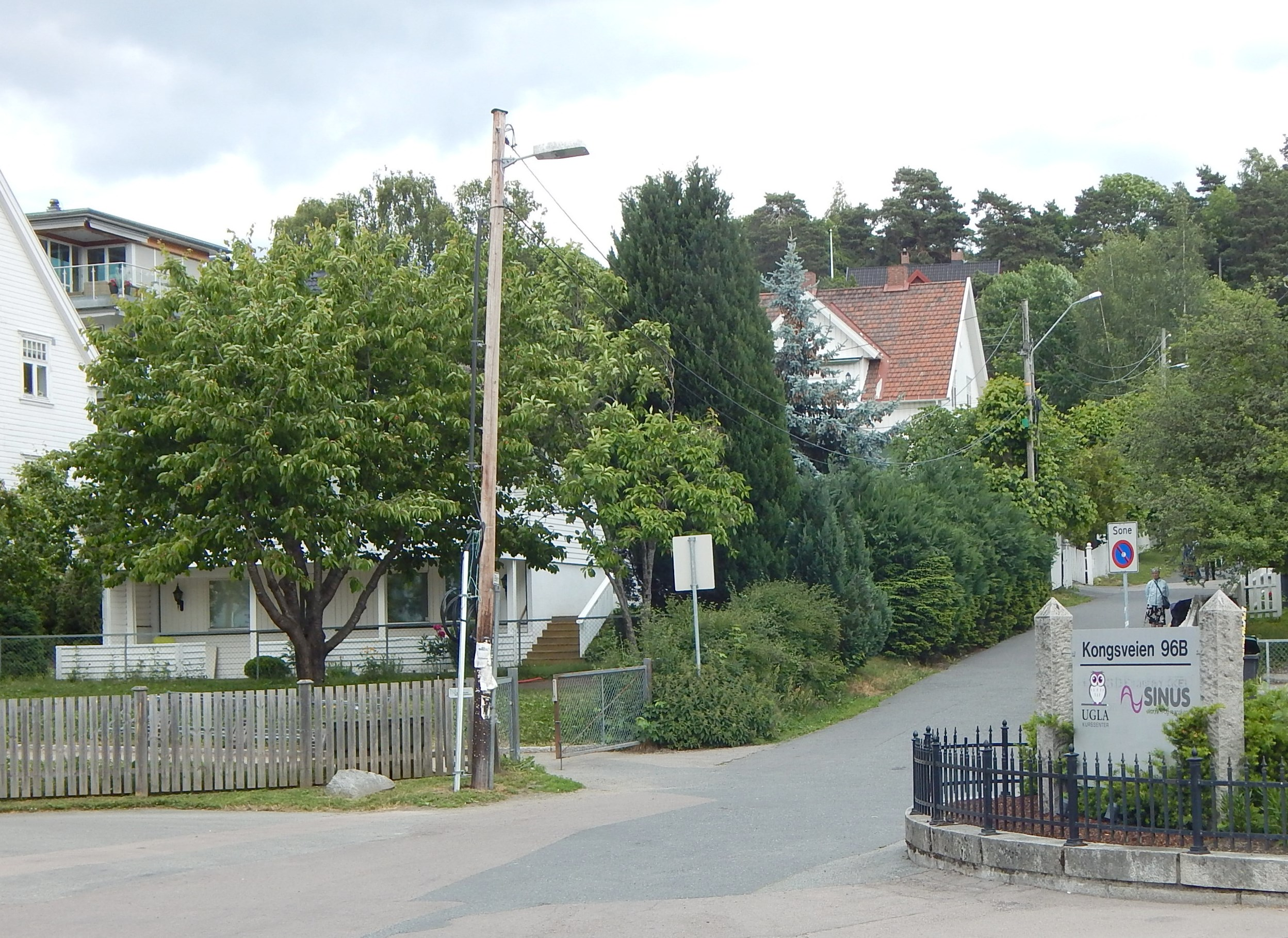 Bernhusveien